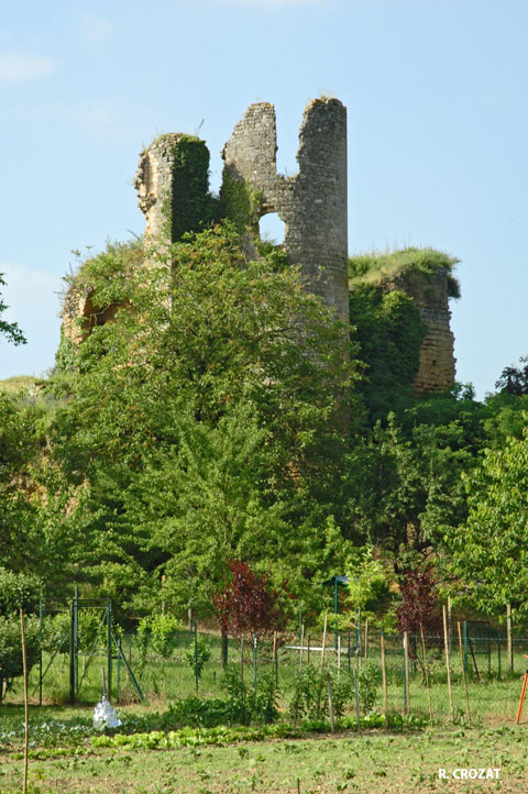 Ruines de Château Larcher dans le Poitou. Vue sur le donjon depuis les fossés.